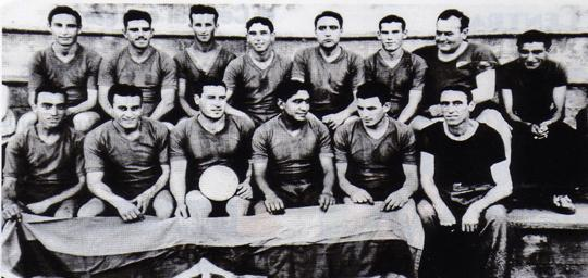 Rosario Central en 1938. Arriba: Constancio Rivero, Ignacio Díaz, Juan Martínez, Pedro Perucca, Justo Lescano, Alfredo Fógel, Juan Fraunhoffer (entrenador); abajo: Salvador Laporta, Oscar Díaz, Pedro de Blasi, Ricardo Cisterna, Aníbal Maffei, José Píccoli (colaborador).